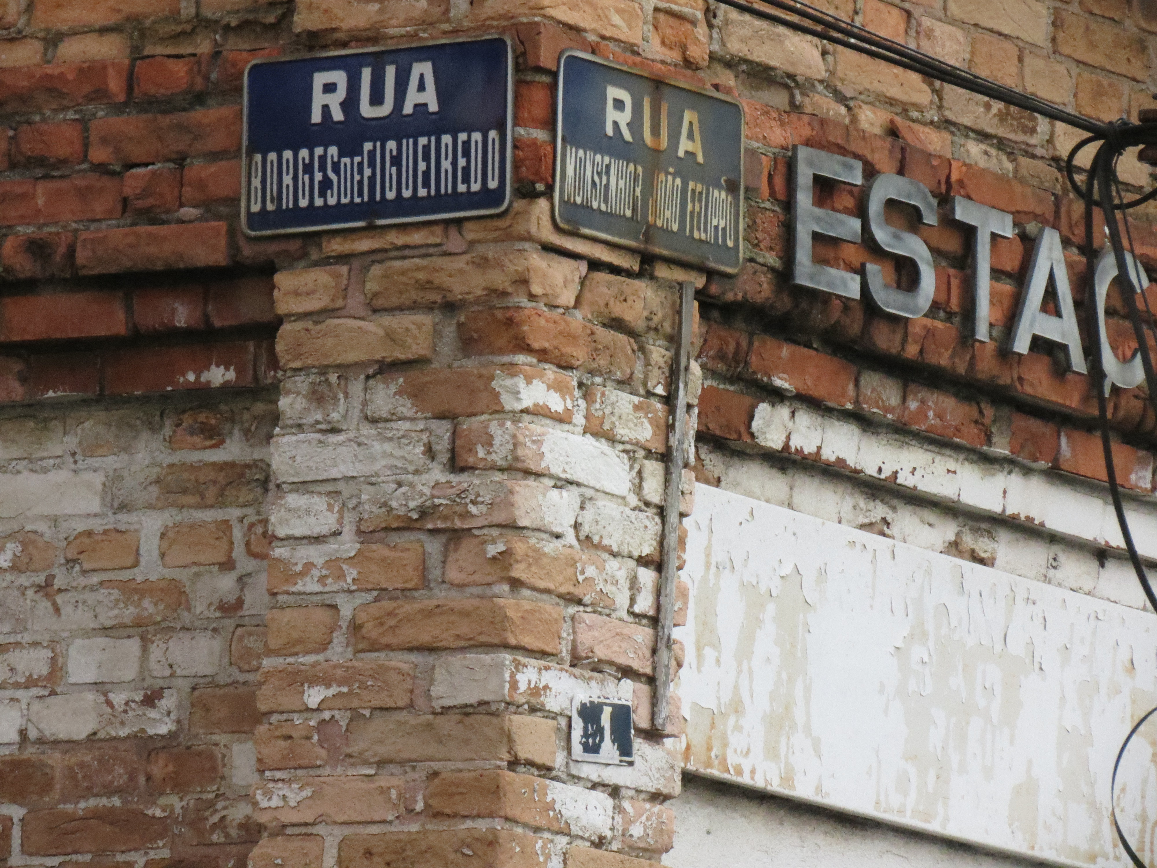 Detalhe das placas indicando as ruas Borges de Figueiredo e Monsenhor João Felippo, bem como a placa que indica do número do edifício (1) e o início do letreiro em que se lê "Estação da Mooca" - Antigas Officinas Casa Vanorden, Mooca, SP